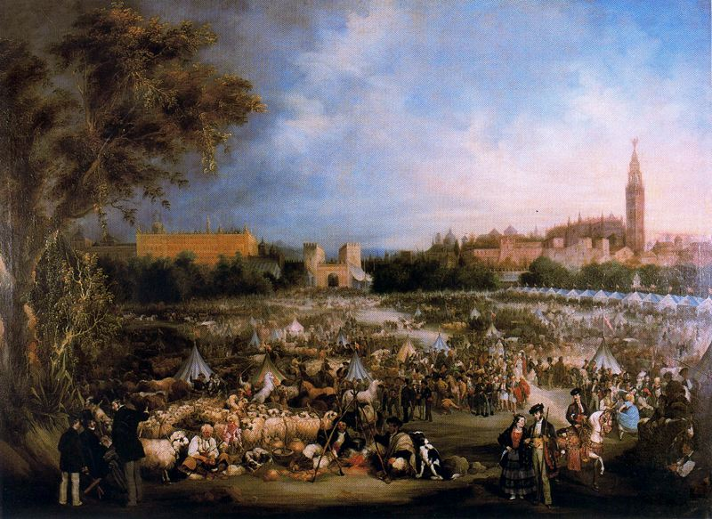 La obra representa la Feria de Abril de la ciudad de Sevilla, en España, a mediados del siglo XIX, y en la imagen pueden observarse, entre otros edificios, la catedral de Sevilla y la Giralda y la desaparecida Puerta de San Fernando, que fue demolida en 1868.